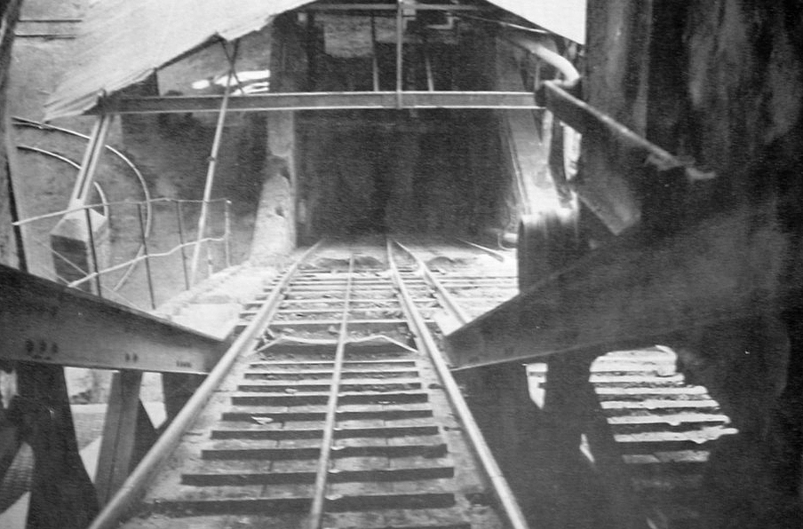 La mine de schiste bitumineux des Télots à Saint-Forgeot à côté d'Autun.